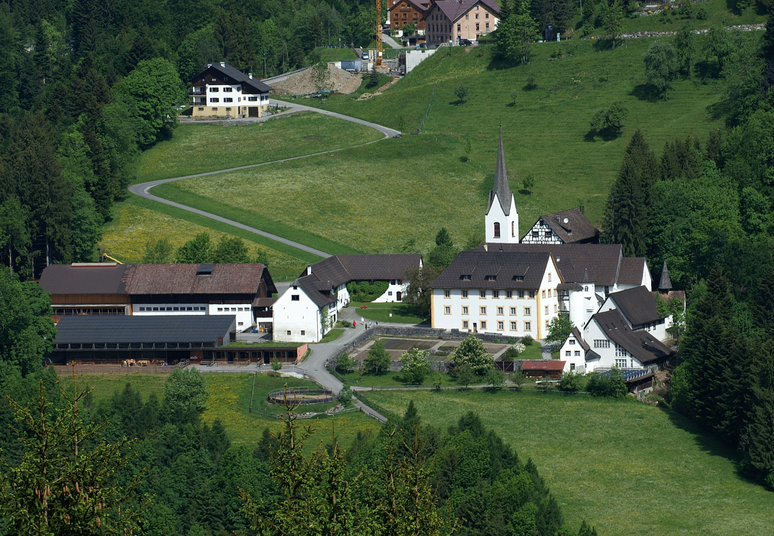 Benediktinerpropstei Sankt Gerold im grossen Walsertal, Vorarlberg.